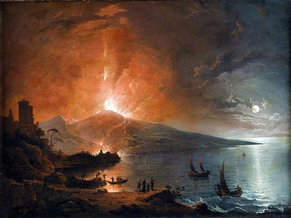 Henry Pether (London, floruit 1828-1865) - Eruzione del Vesuvio.